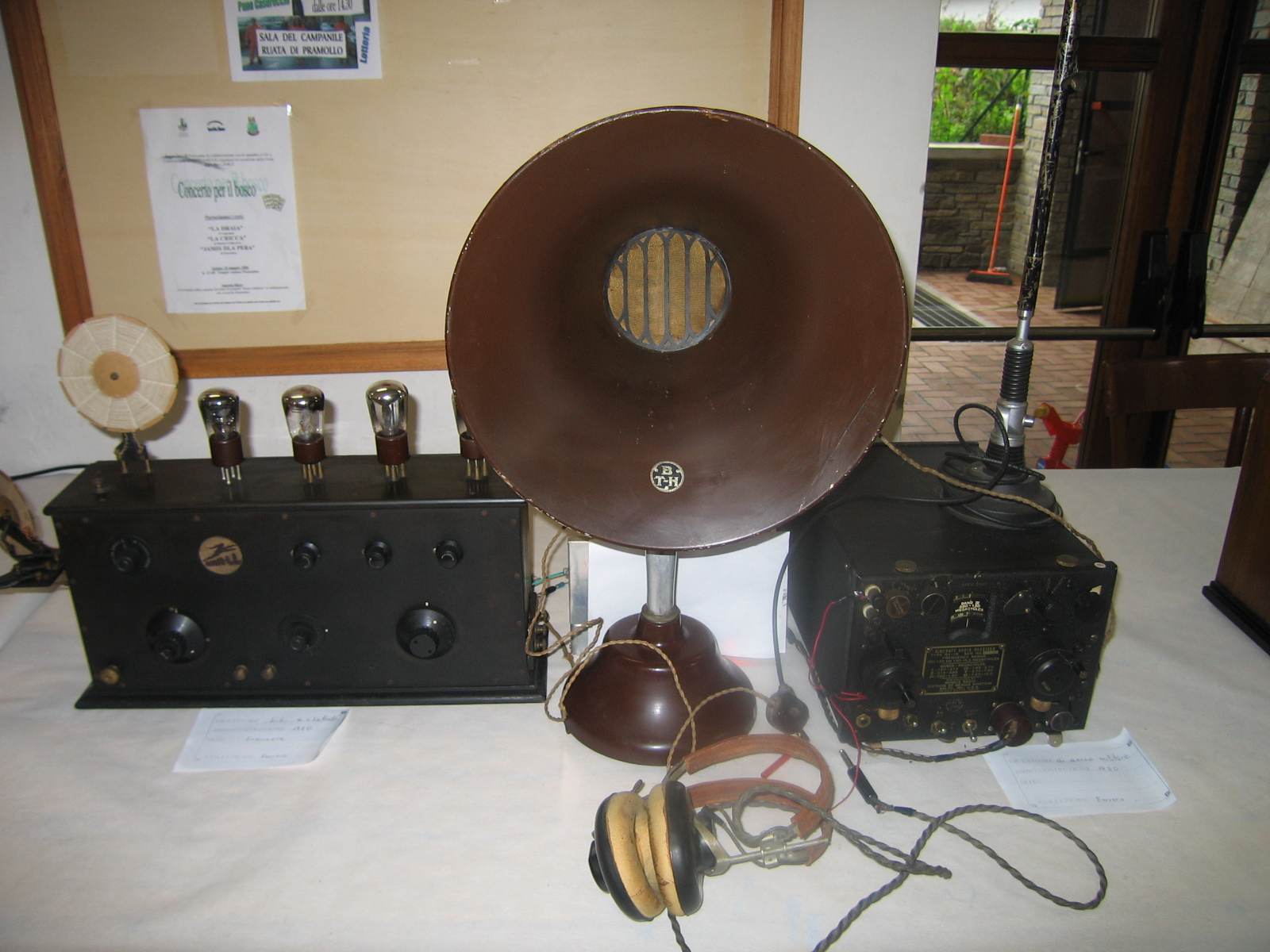 Ricevitore da aereo militare.